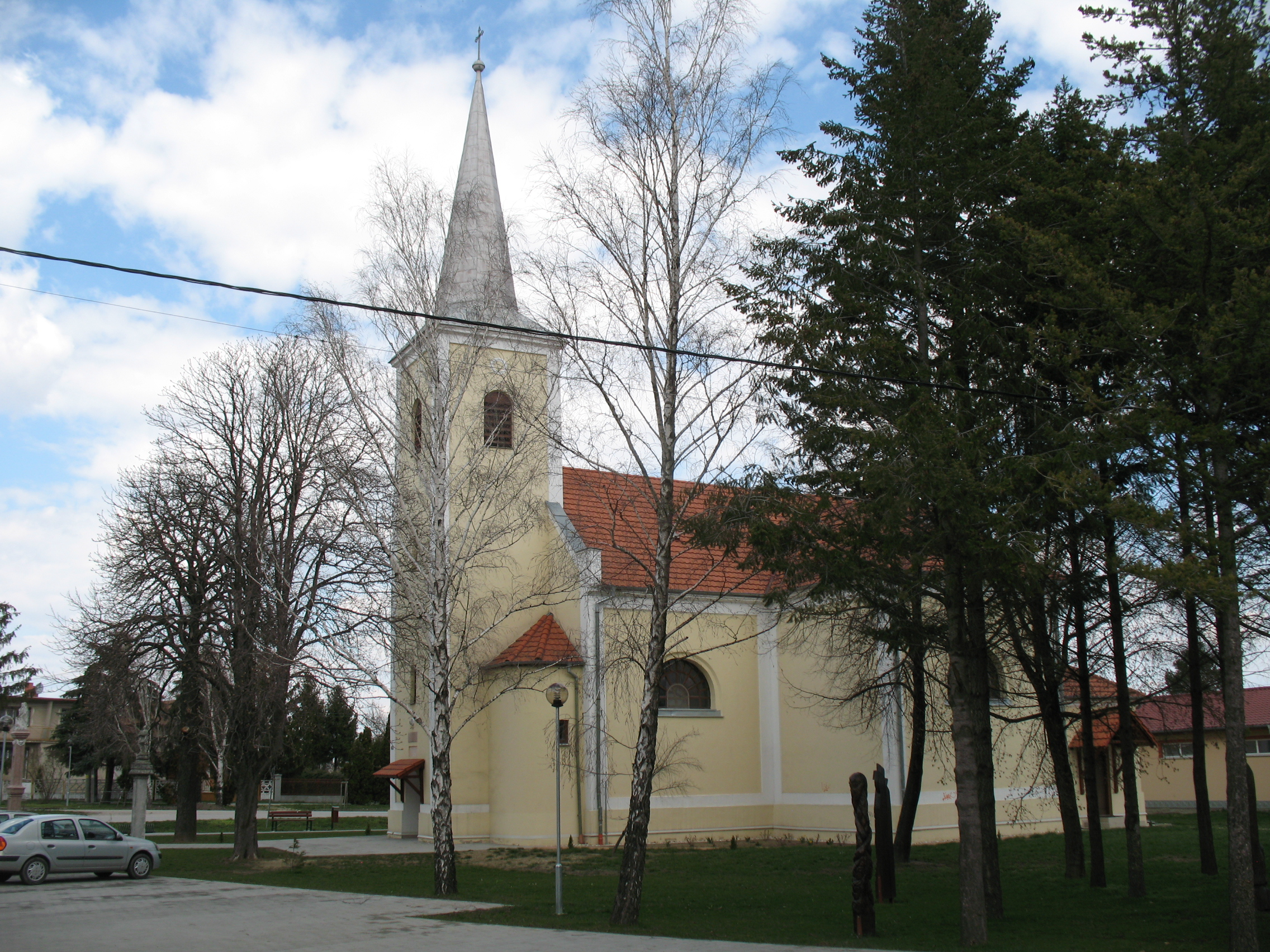 Zsigárd